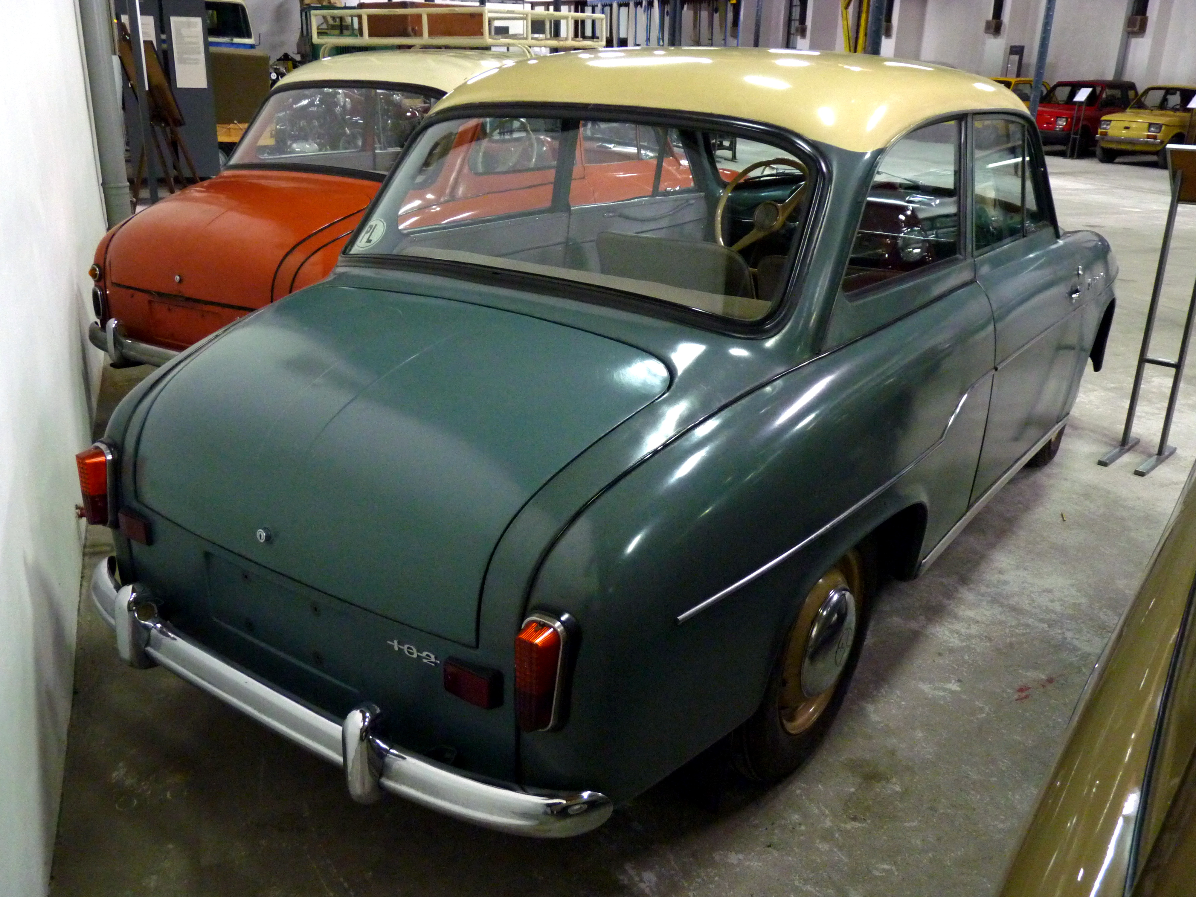 FSO Syrena 102 in Muzeum Inżynierii Miejskiej in Kraków.